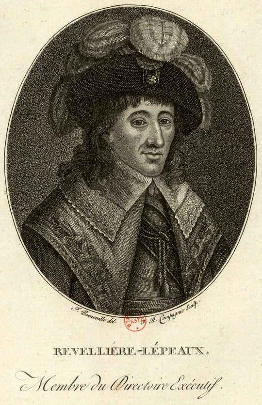 Reveillière-Lépeaux : membre du Directoire executif (estampe représentant Louis-Marie de La Révellière-Lépeaux (1753-1824) en costume de Directeur.)